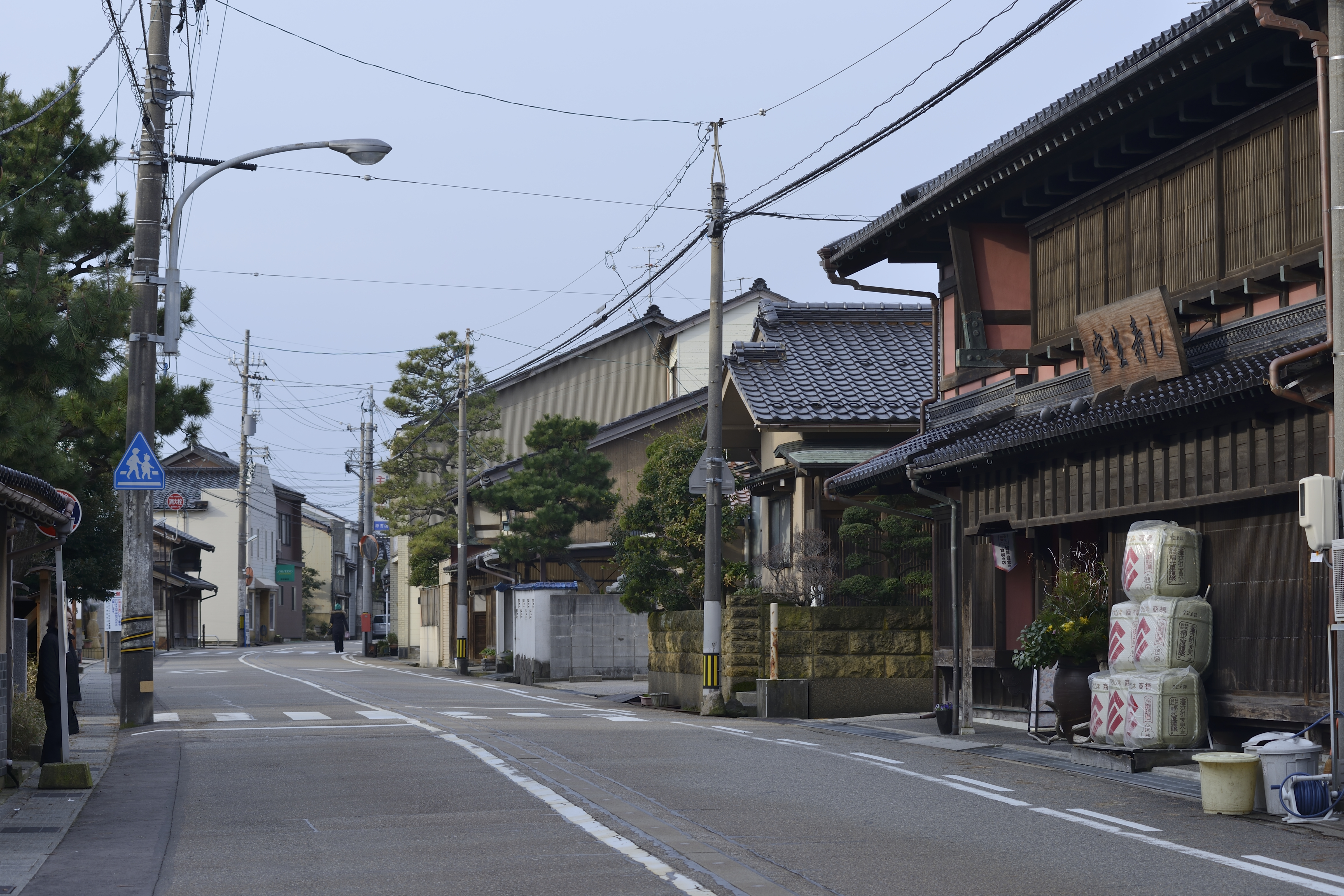 大野町並み